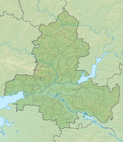 Физическая карта Ростовской областиРавноугольная проекция, растяжение — 150 %. Координаты краёв: север — 50.5° С юг — 45.5° С восток — 44.5° В запад — 38.0° В